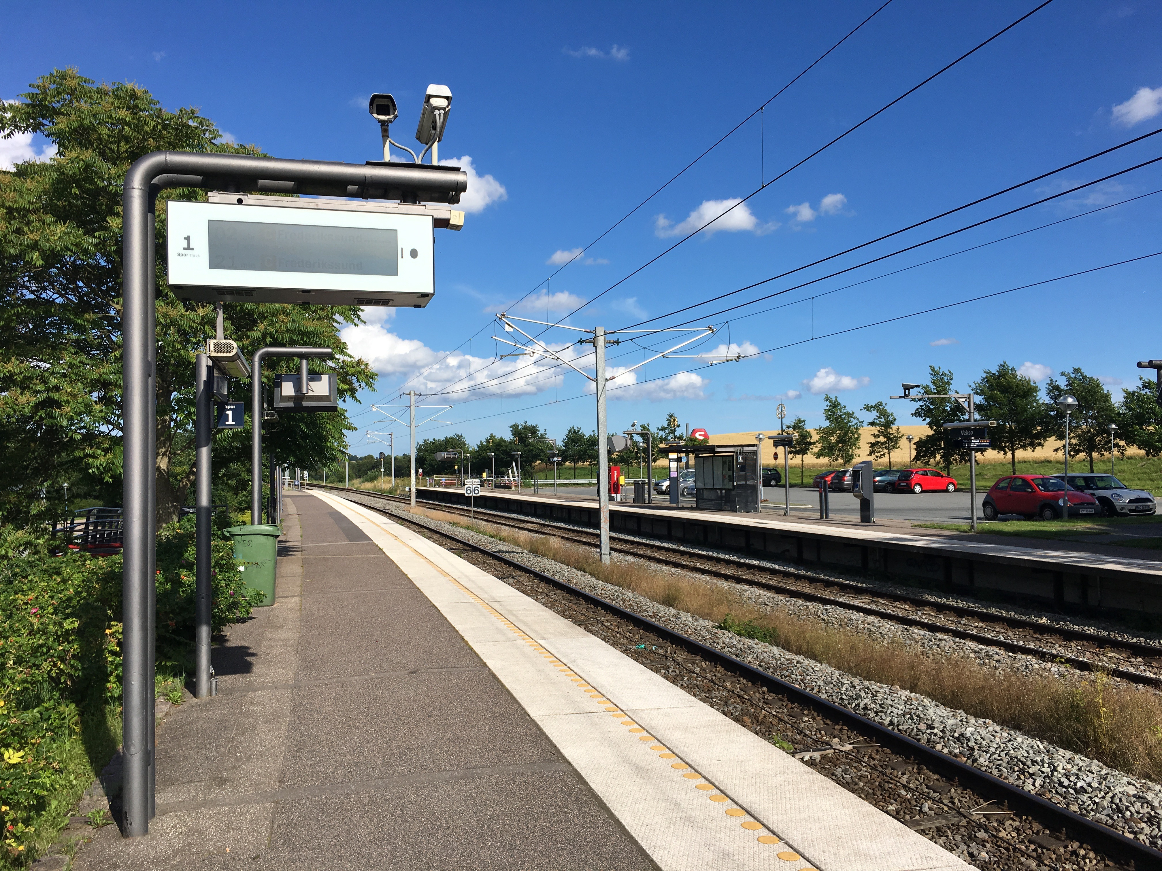 Veksø Station, spor 1, Veksø, Sjælland